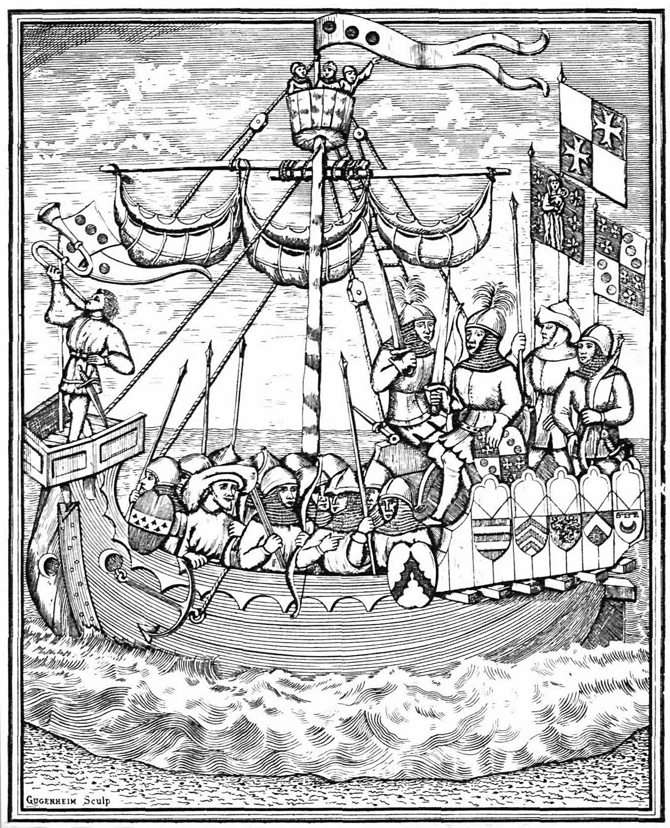 Imagen de la expedición de Jean de Bethencourt y Gadifer de la Salle a la Isla de Lanzarote en 1402.